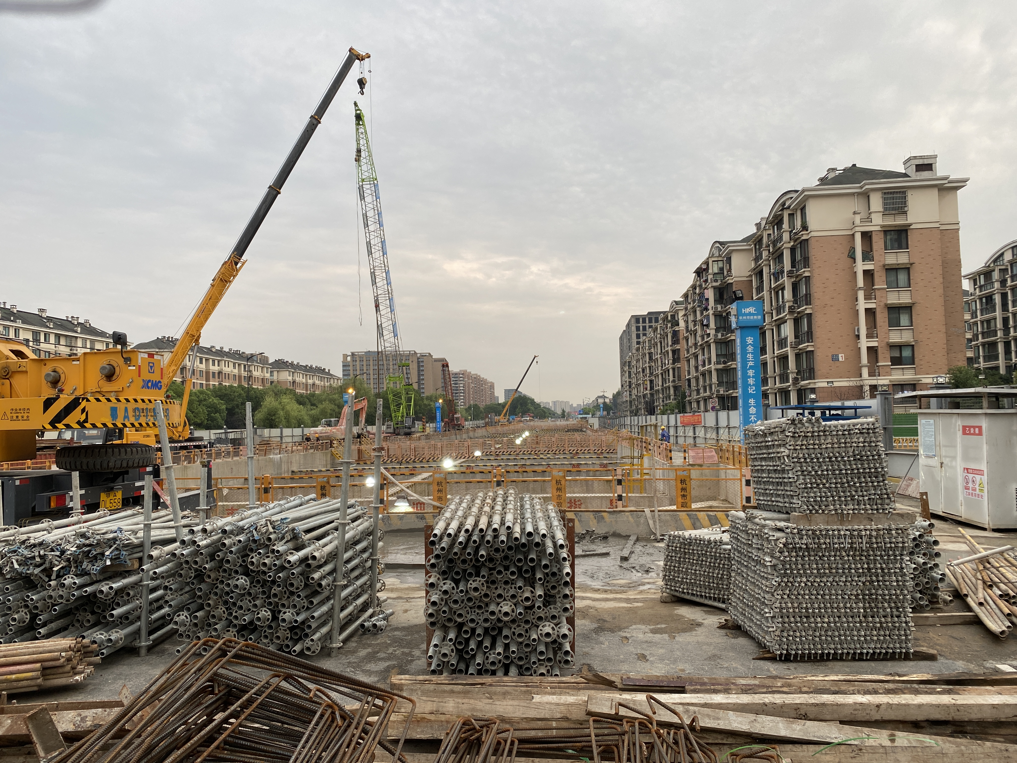 20200725丁桥站工地